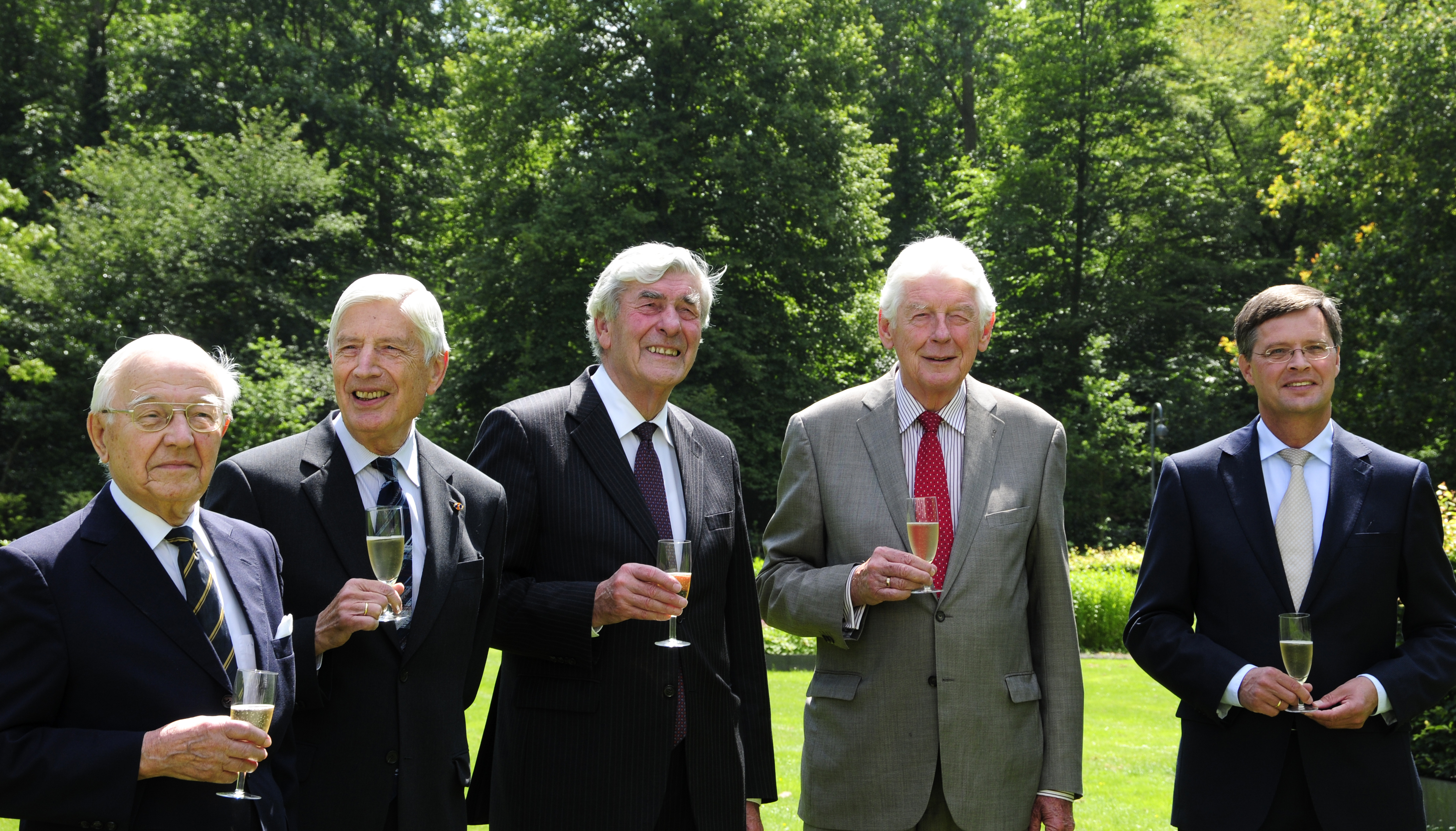 Minister-president Rutte ontvangt oud-ministers-presidenten De Jong, Van Agt, Lubbers, Kok en Balkenende op het Catshuis om ervaringen uit te wisselen. ‘Er komt werkelijk een schat aan kennis door de deur als deze heren binnenkomen’ aldus de minister-president. Het wordt een jaarlijkse ontmoeting. Minister-president Rutte heeft zijn voorgangers voor volgend jaar al uitgenodigd en noemde de ontmoeting ‘de start van een nieuwe traditie’.